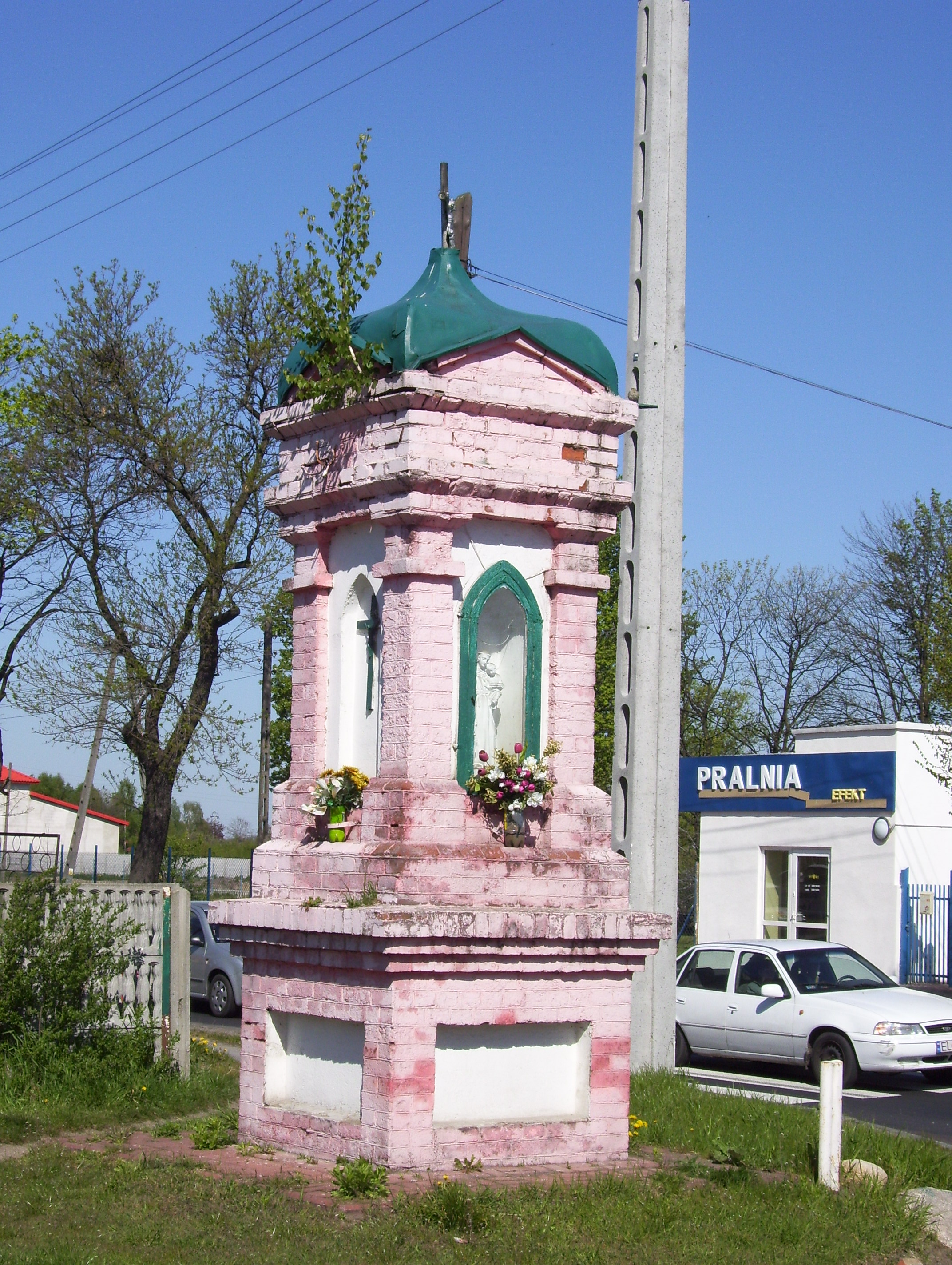 Kapliczka przy skrzyżowaniu ul. Brzezińskiej i Listopadowej. Kapliczka na osiedlu Sikawa.